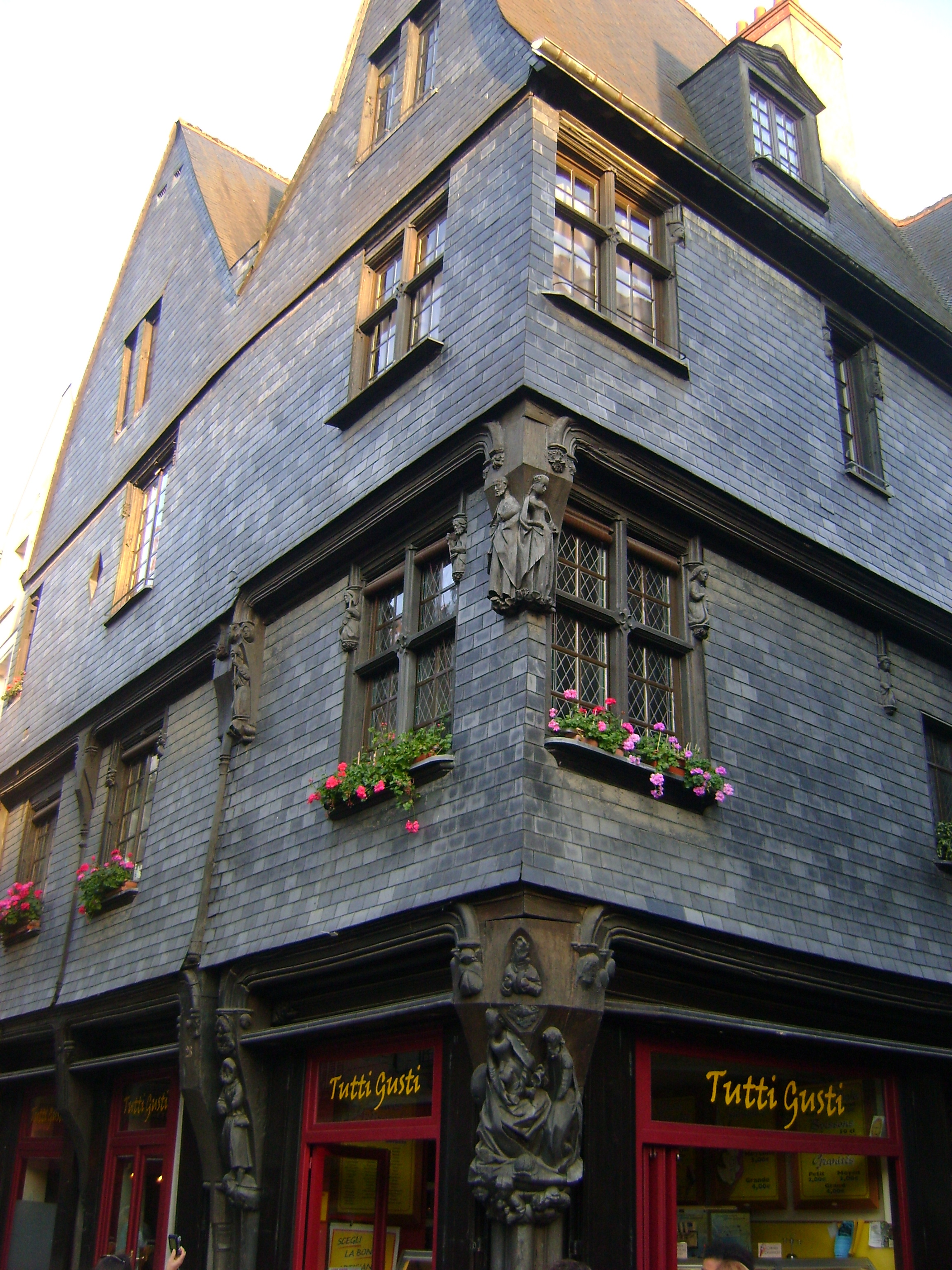 Maison à l'angle de la rue de la monnaie et de la rue du change à Tours, Indre-et-Loire. .